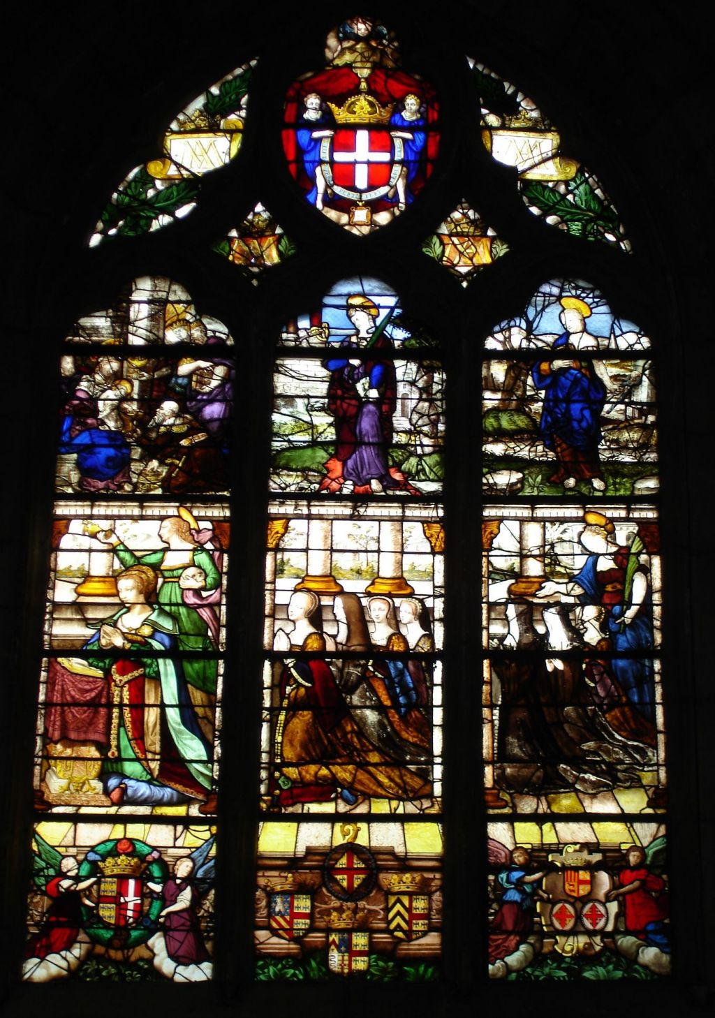 Vitrail de Madeleine de Savoie et ses filles - Collégiale saint-Martin de Montmorency, Val-d'Oise (France) - Juillet 2006 Photo personnelle de clicsouris